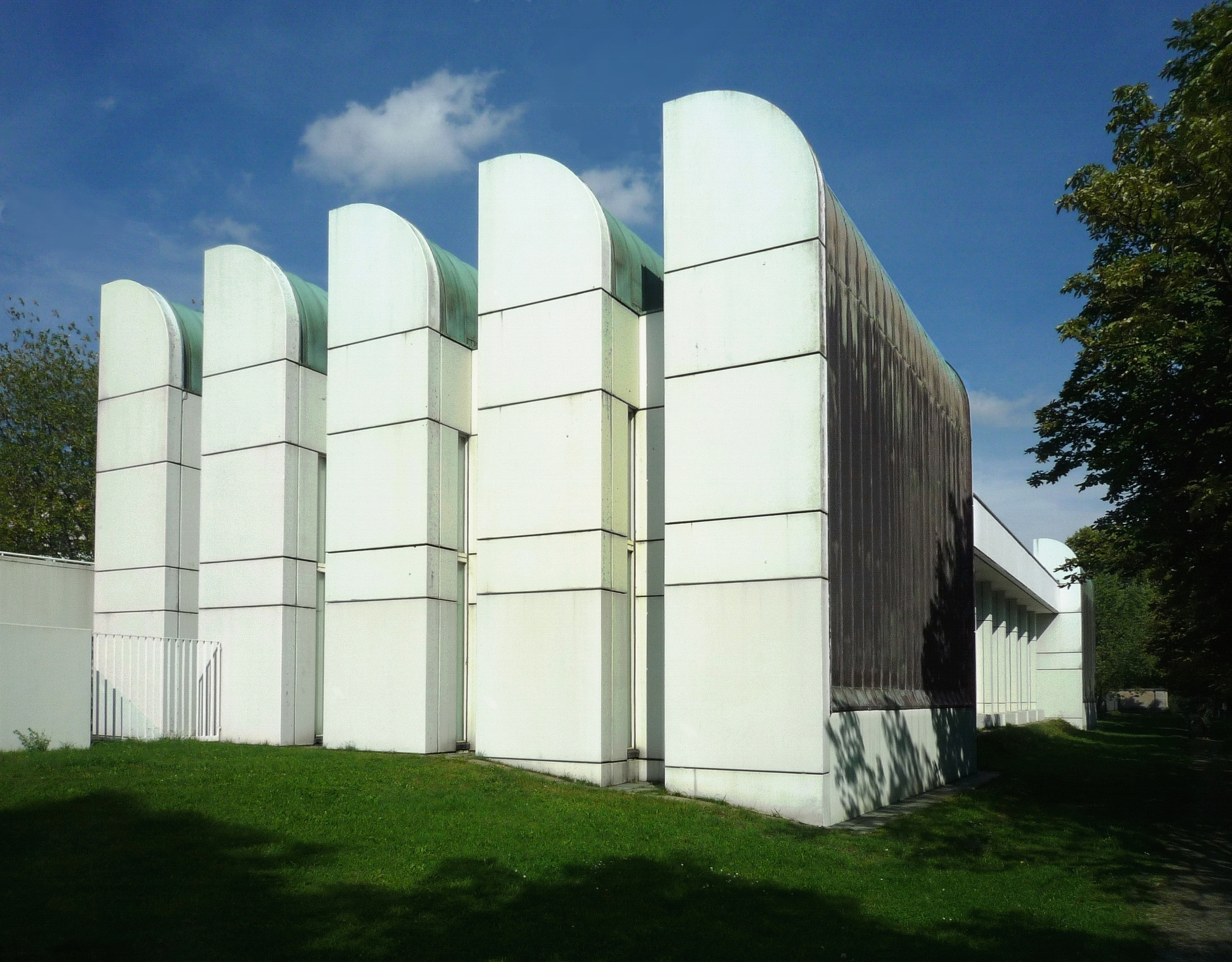 Bauhaus-Archiv, Museum für Gestaltung. Klingelhöfer Str. 14, 10785 Berlin. Fertiggestellt 1979 nach einem modifizierten Entwurf, den Walter Gropius 1964 ursprünglich für einen Standort in Darmstadt geliefert hatte. Seit 1997 unter Denkmalschutz. OBJ-Dok-Nr.: 090 50 377.